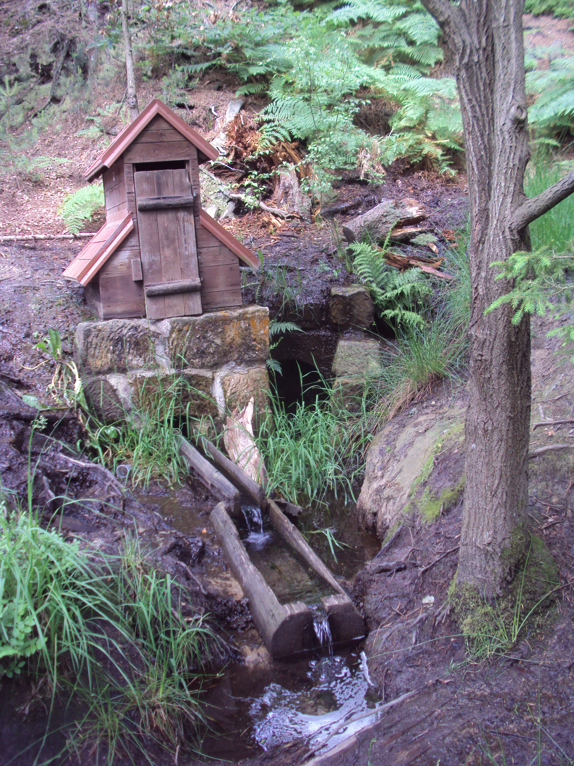 Studánka v Údolí samoty mezi Cvikovem a Novým Borem